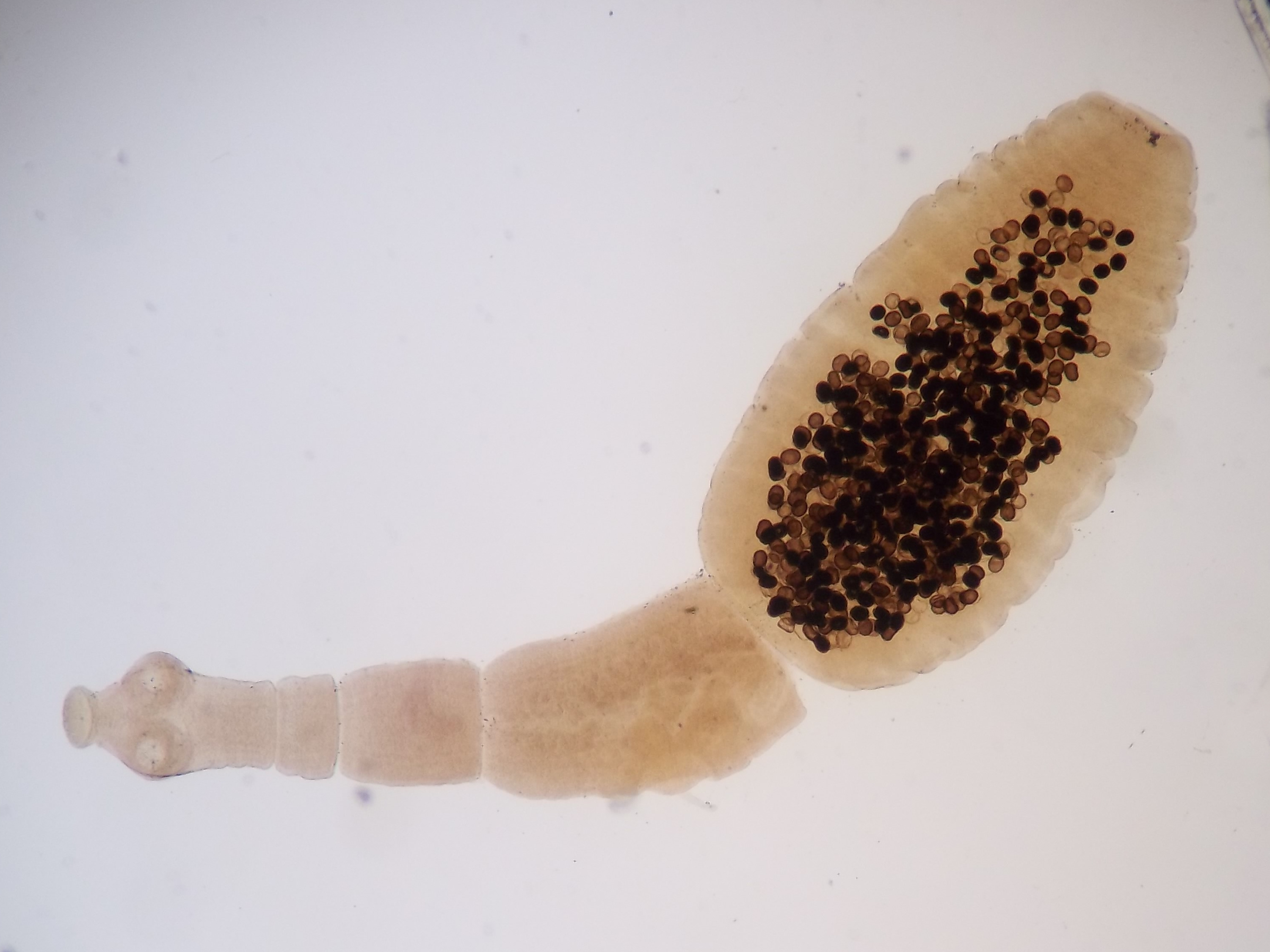 Vista panorámica al microscopio óptico de Echinococcus granulosus